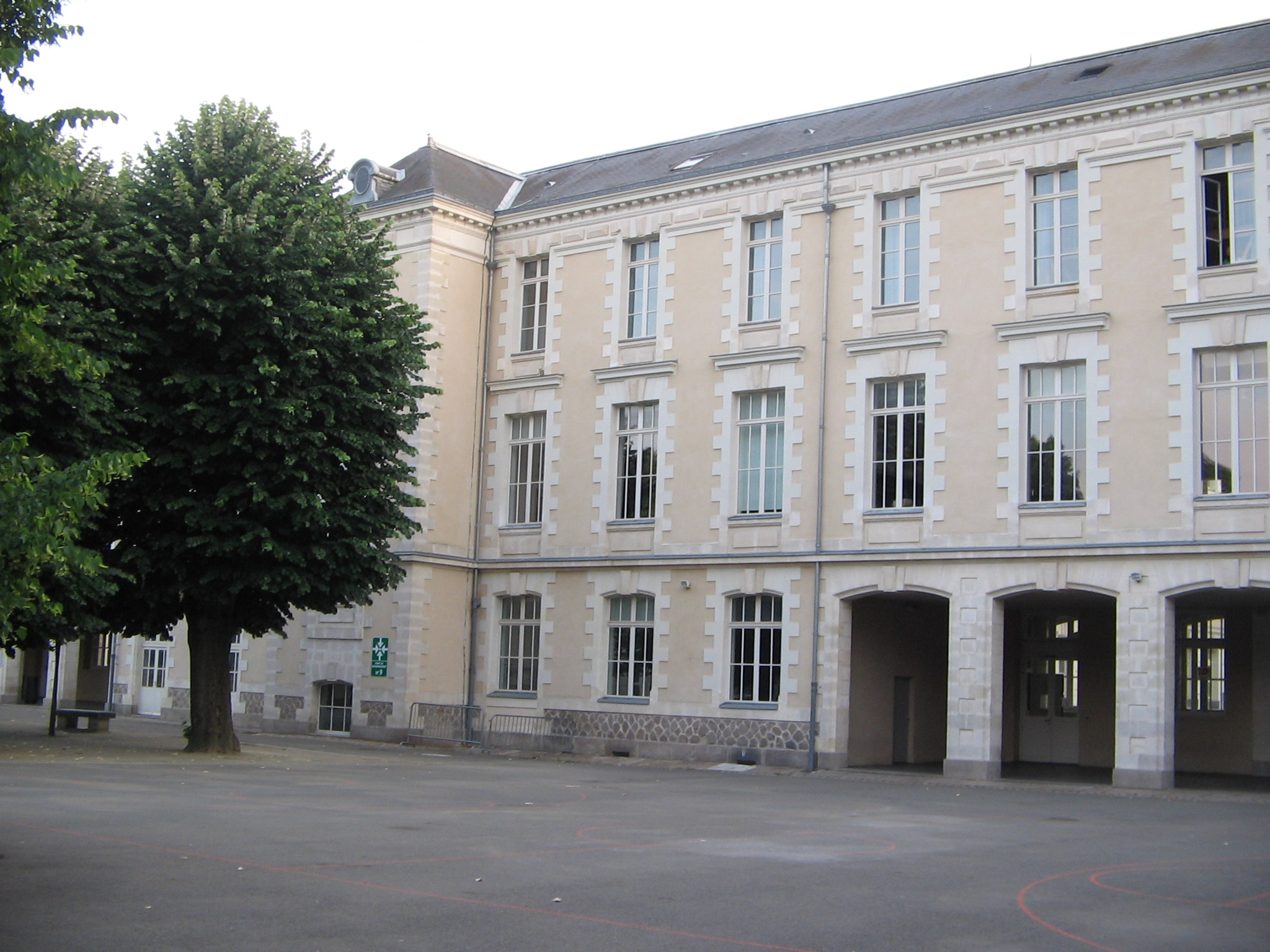 Lycée Clemenceau (Nantes), vue du batiment K et la cour principale